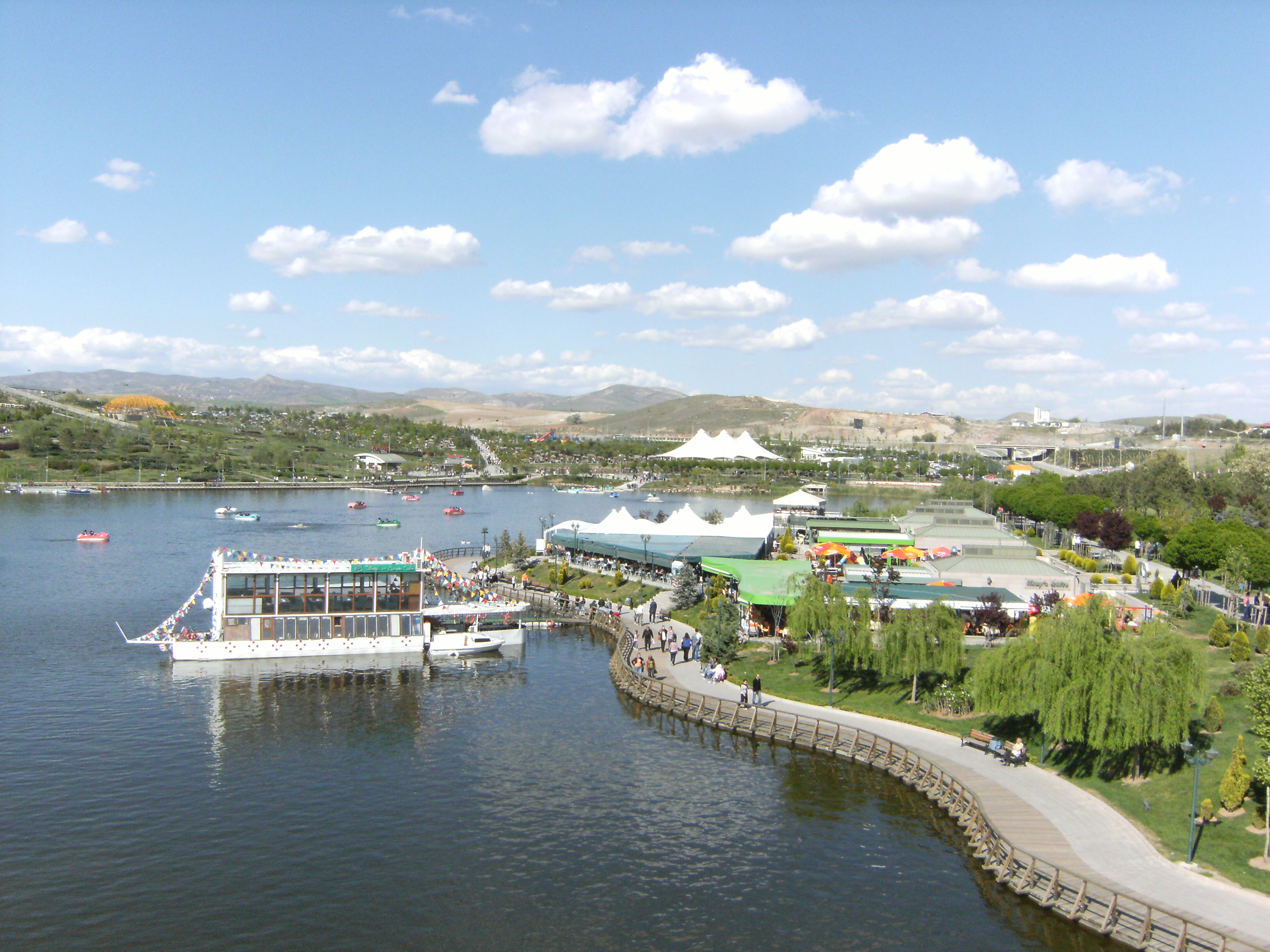 Ankara, Eryaman'da bulunan Göksu park